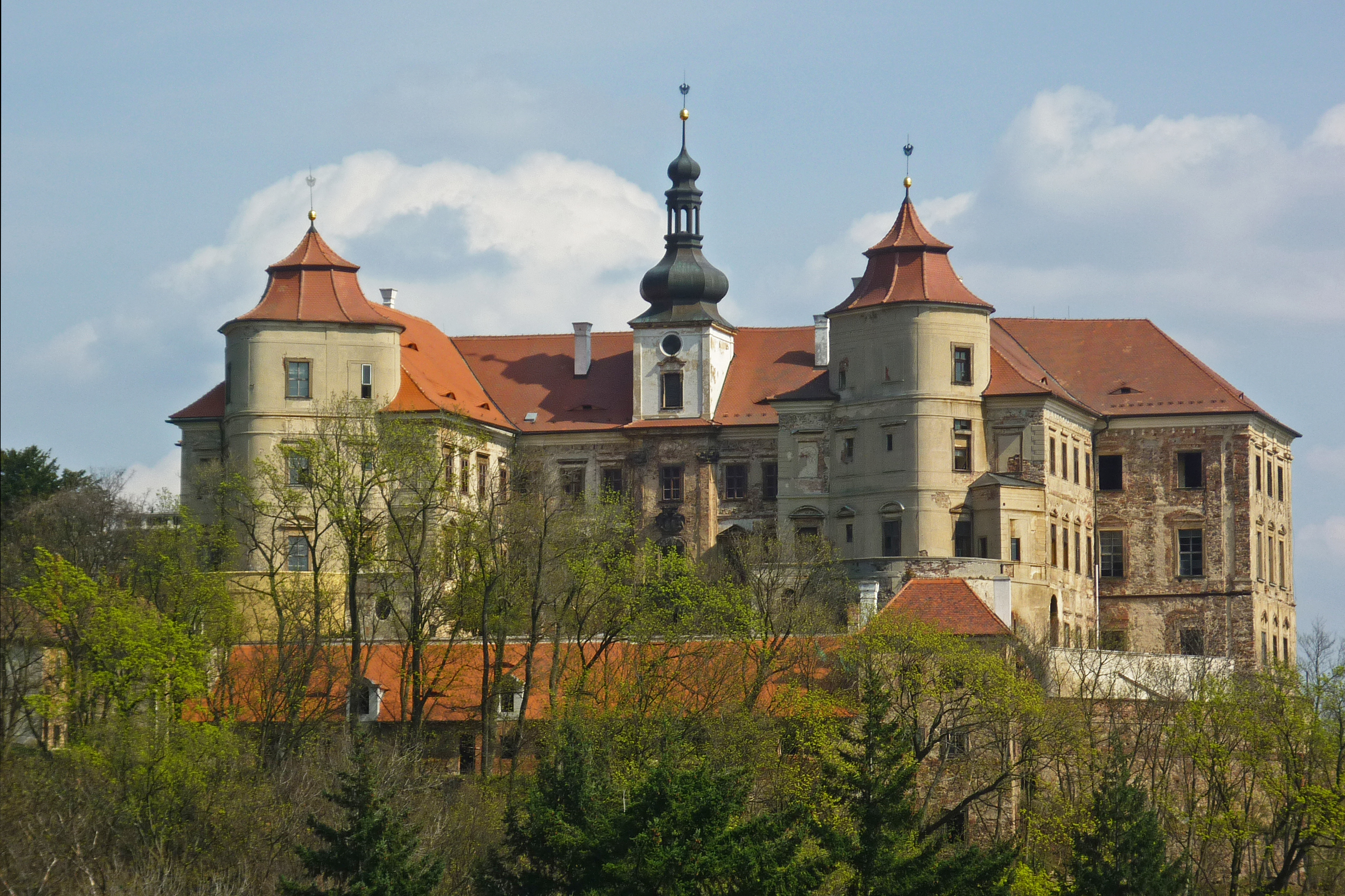 Schloss Eisenberg (Zámek Jezeří) bei Horní Jiřetín (Obergeorgenthal)